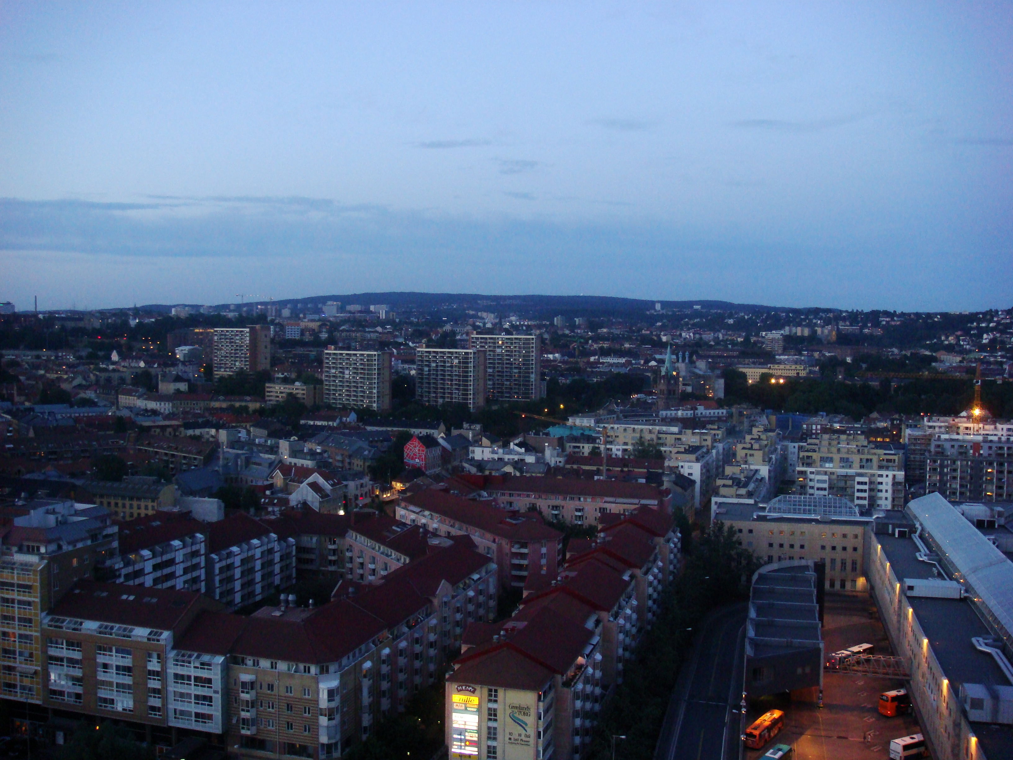 Oslo midnight view. Seen from Oslo Plaza